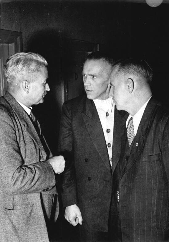 Illus/Sturm 10.10.51 Ausserordentliche Volkskammersitzung Auf einer Außerordentlichen Volkskammersitzung am 10.10.51 antwortete Ministerpräsident Grotewohl auf die Vorschläge des Bundestages. UBz: V.l.n.r. Abgeordneter Georg Lotz (VdgB Thüringen) im Gespräch mit dem Abgeordneten Rudolf Lessig (DBD Thüringen) und dem Abgeordneten Walter Biering (VdgB Sachsen-Anhalt).